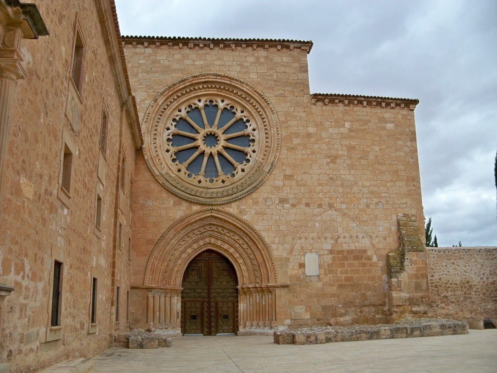 Monasterio Cisterciense Santa María de Huerta, en Soria, España. Donde ingresó Pedro de Oviedo y Falconi en el siglo XVII